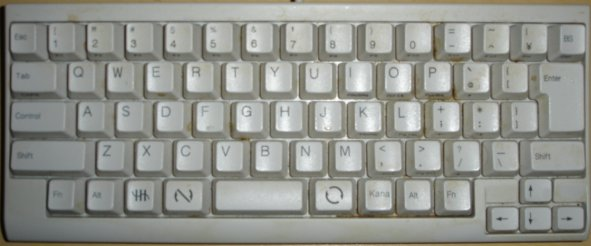 株式会社PFU Happy Hacking Keyboard Lite 2 撮影日: 2005/10/19 撮影者: -tomo